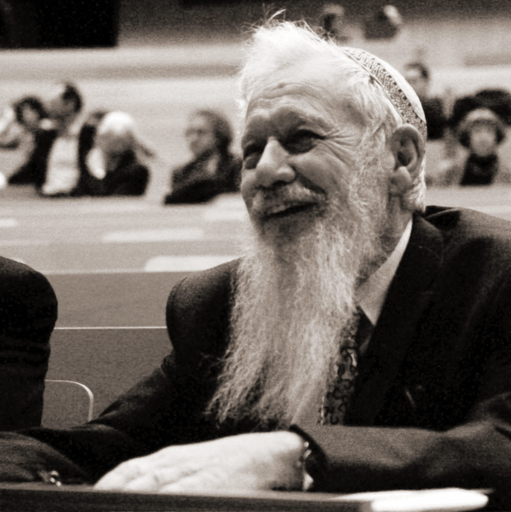 Robert Aumann à la Journée de la Recherche, le 16 septembre 2006 à l'EPFL